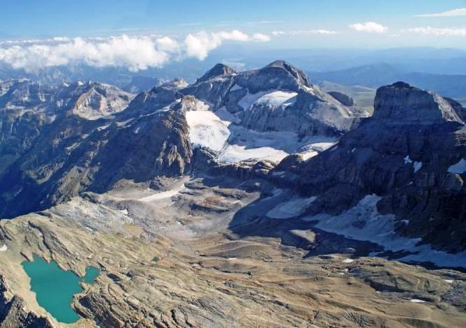 Face Nord du Mont Perdu et du Cylindre vue d'avion en septembre 2011